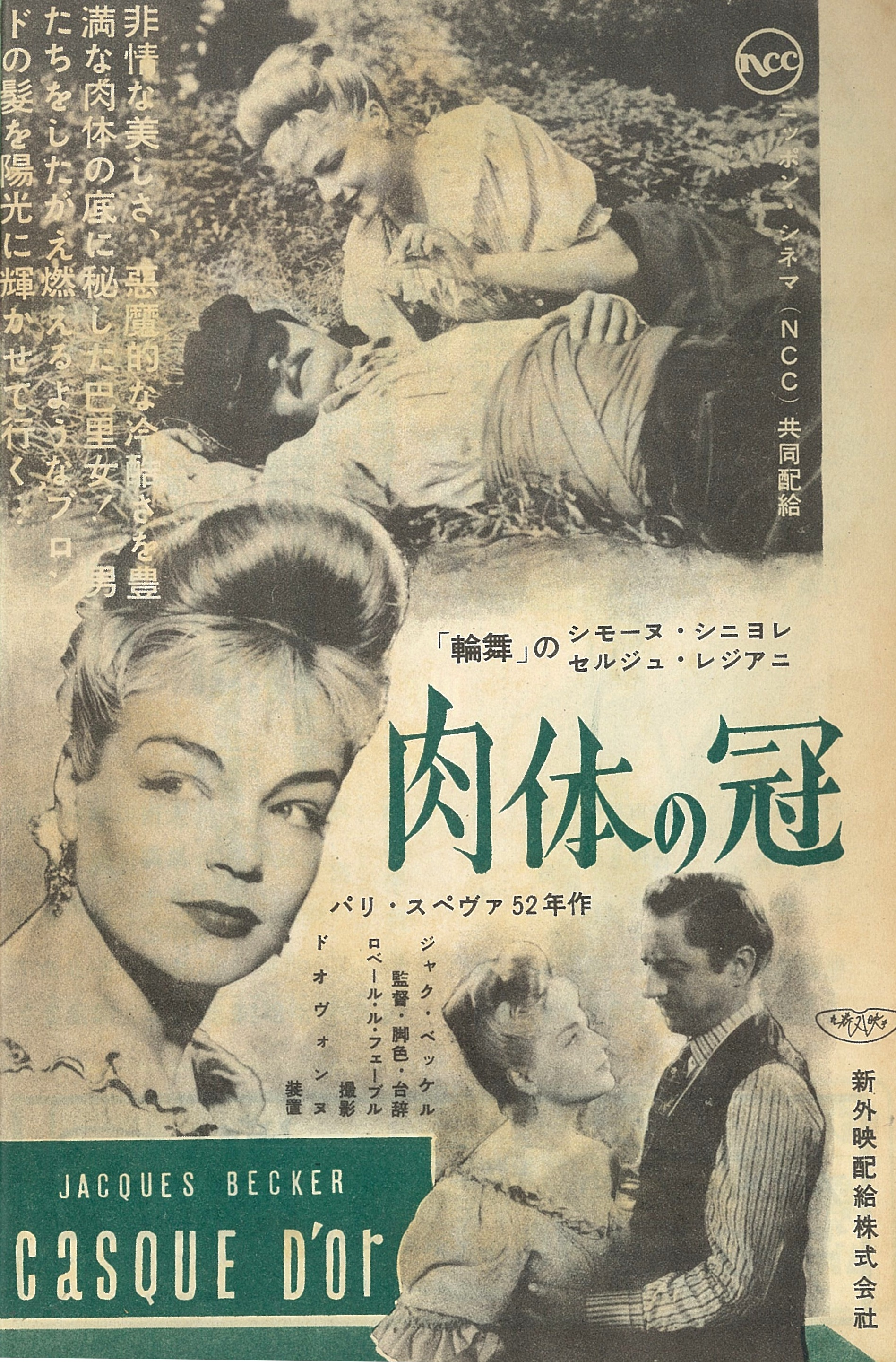 Movie poster for "Casque d'or" from Eiga no Tomo (November 1952). Simone Signoret.